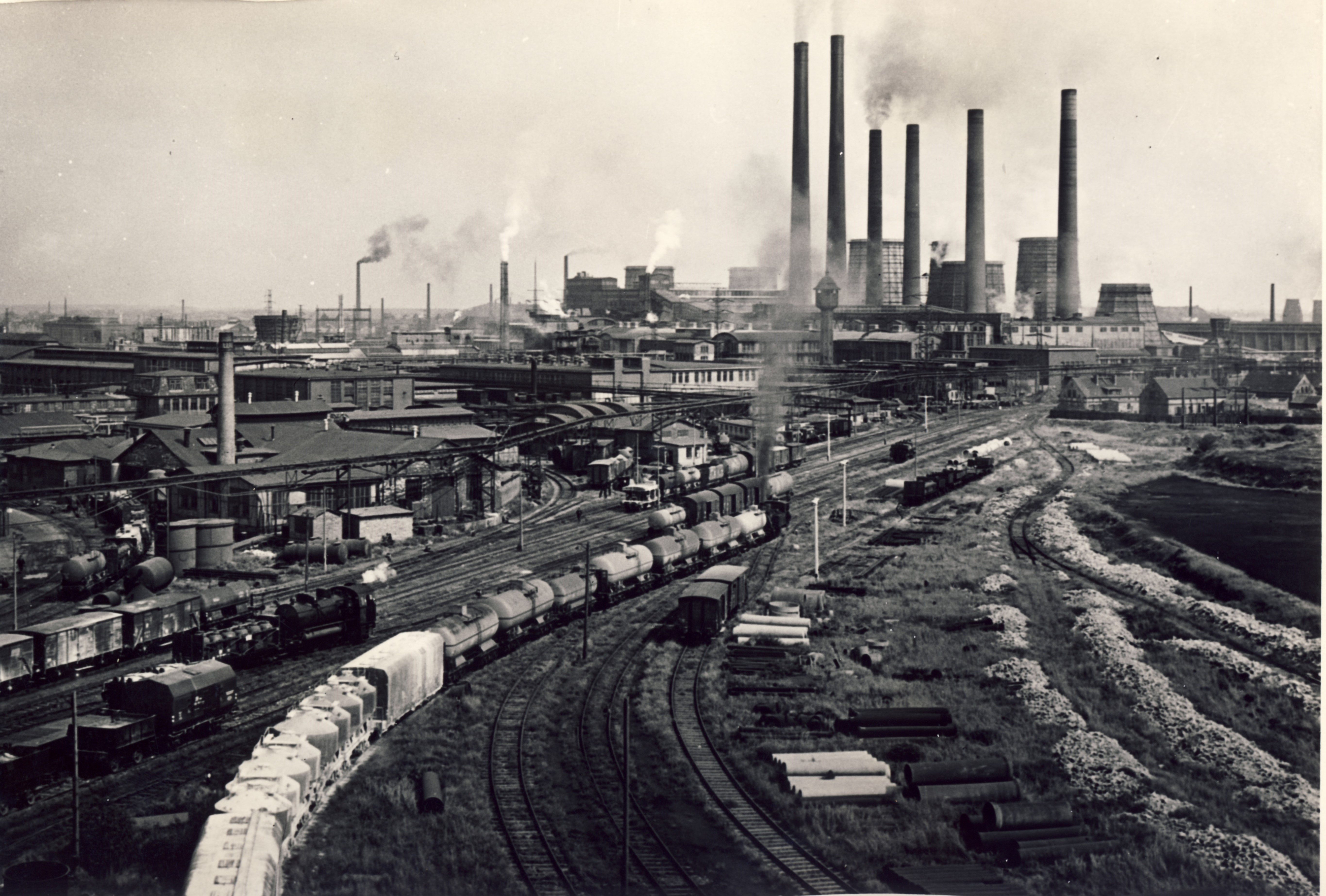 Blick über das EKB Werk Süd 1964